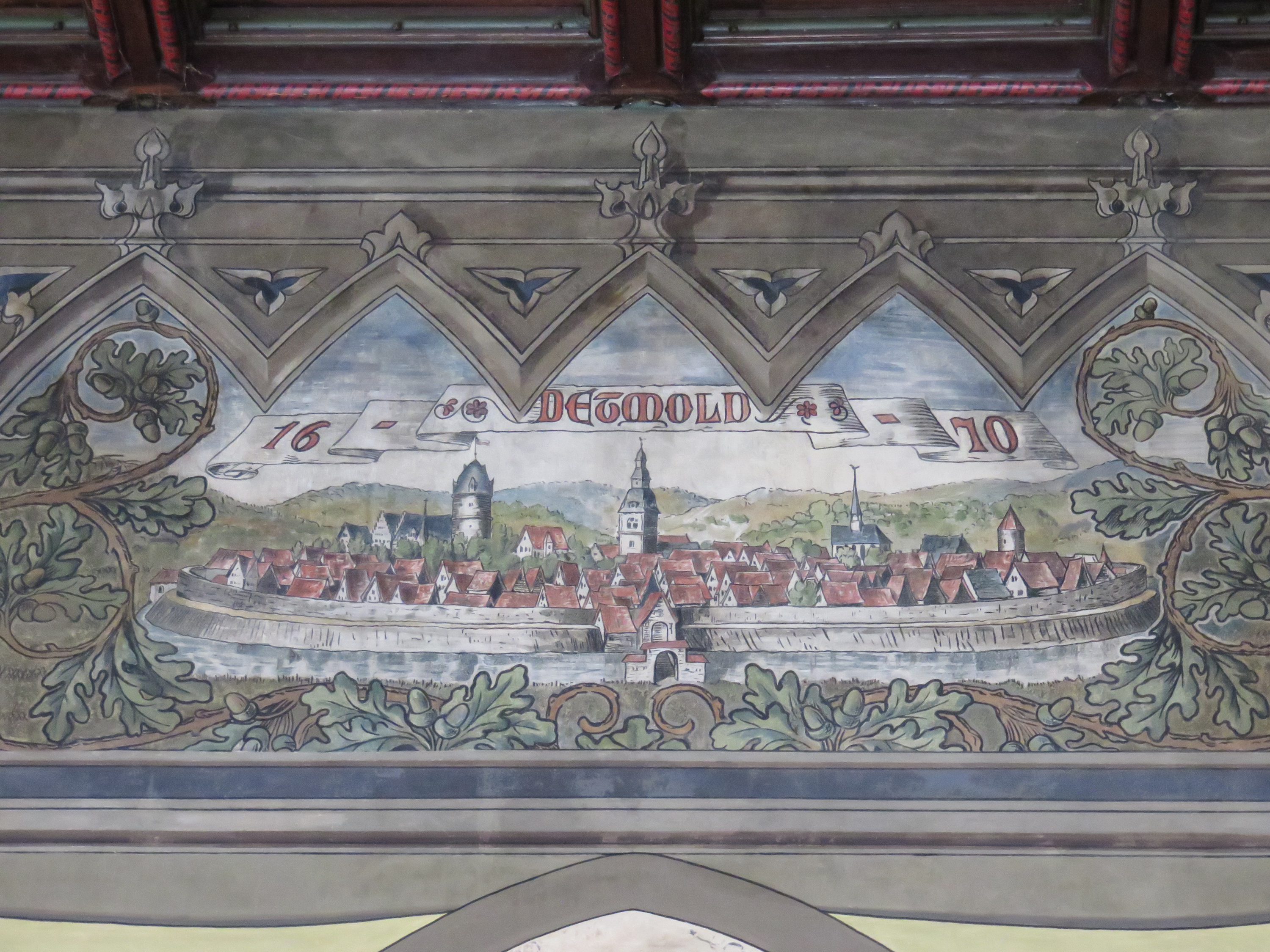 Das Fürstenzimmer am Detmolder Bahnhof wurde 1880 erbaut und 2007 saniert.